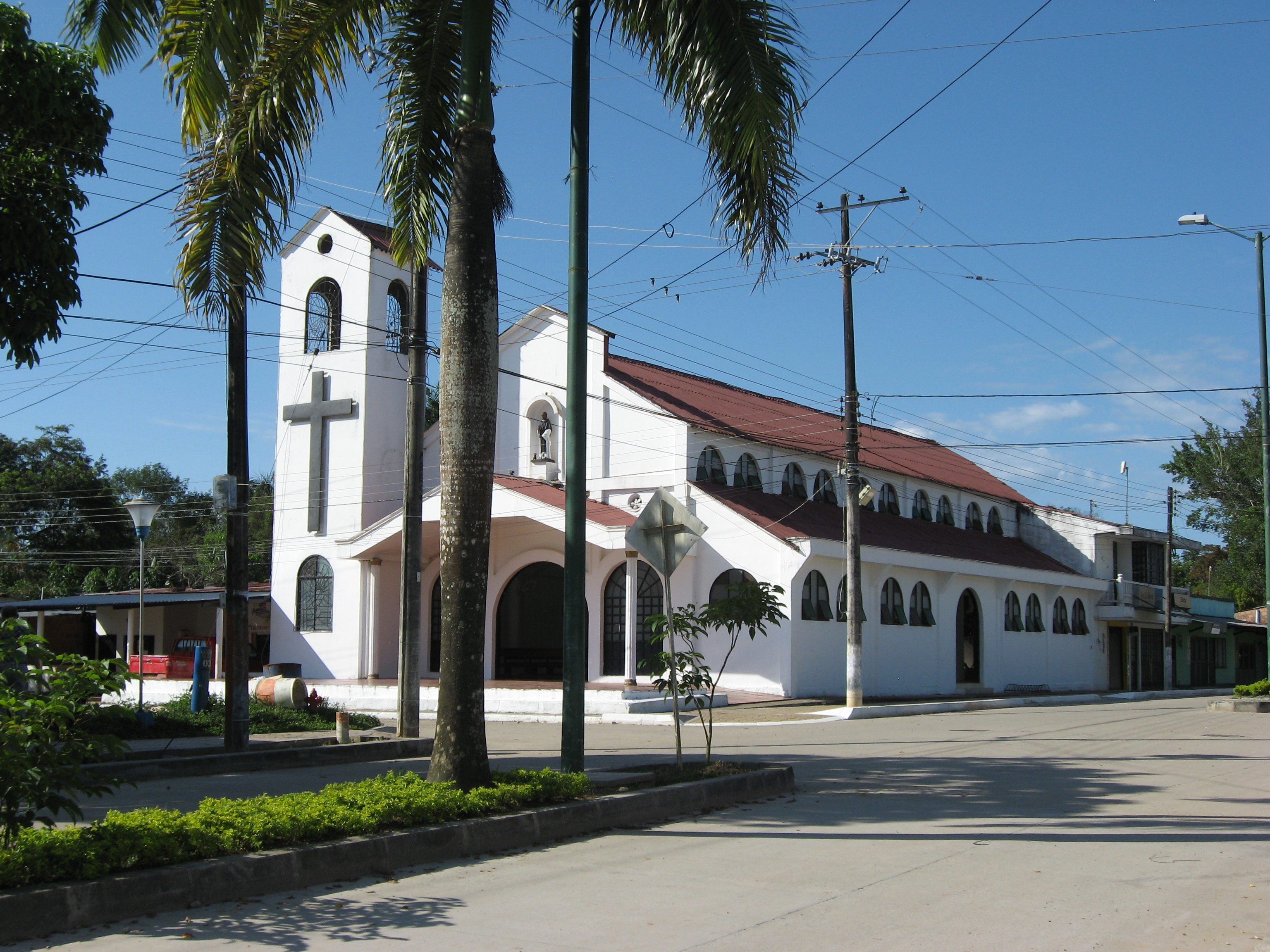 Una de las más bellas construcciones en el joven municipio de Cabuyaro es el templo de la iglesia Católica Esta fotografía fue tomada en el municipio colombiano con código 50124.